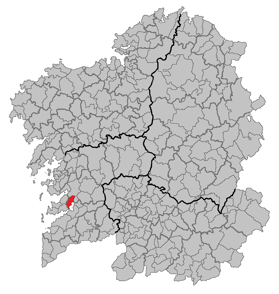 Mapa coa localización do concello de Vilaboa.